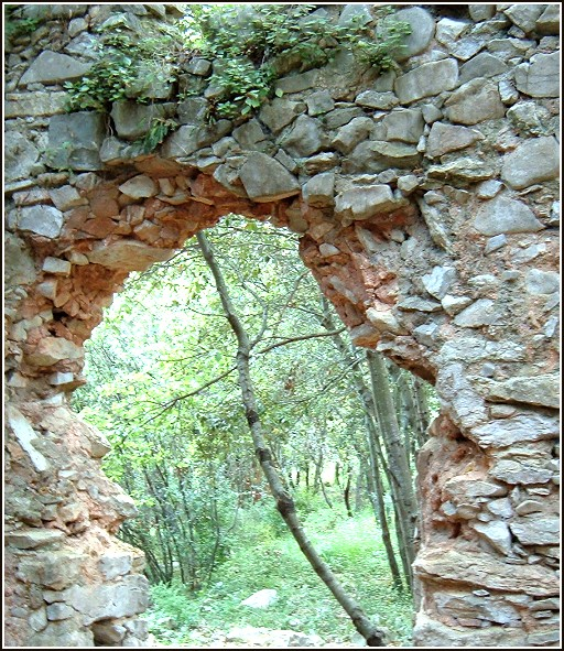 Kragbogen in einer Maueröffnung, nachdem der Türsturz heraus gefallen ist.